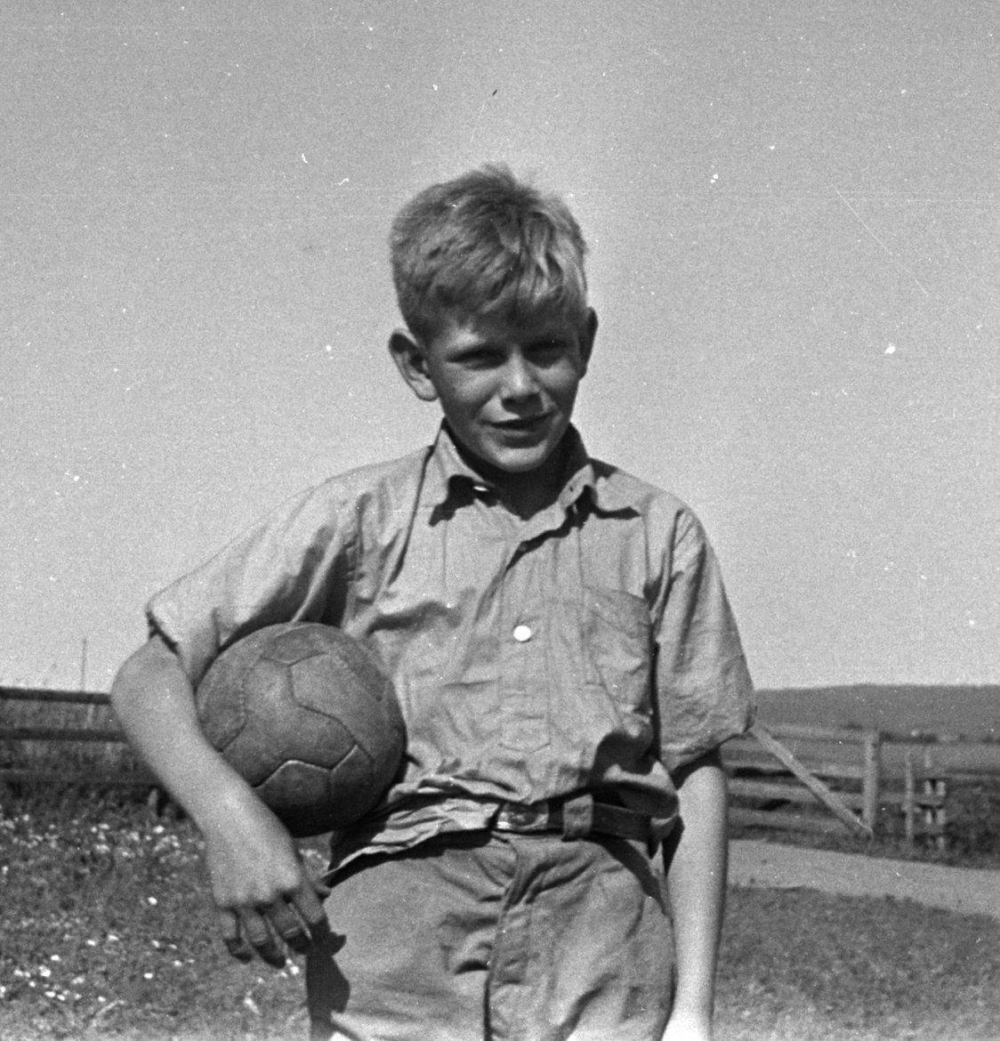 Odd Kjell Skjegstad på Uthus i Romedal.